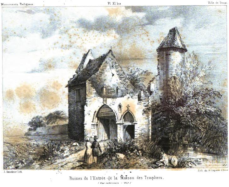 Maison des templiers de Douai - Ruines entrée - 1843